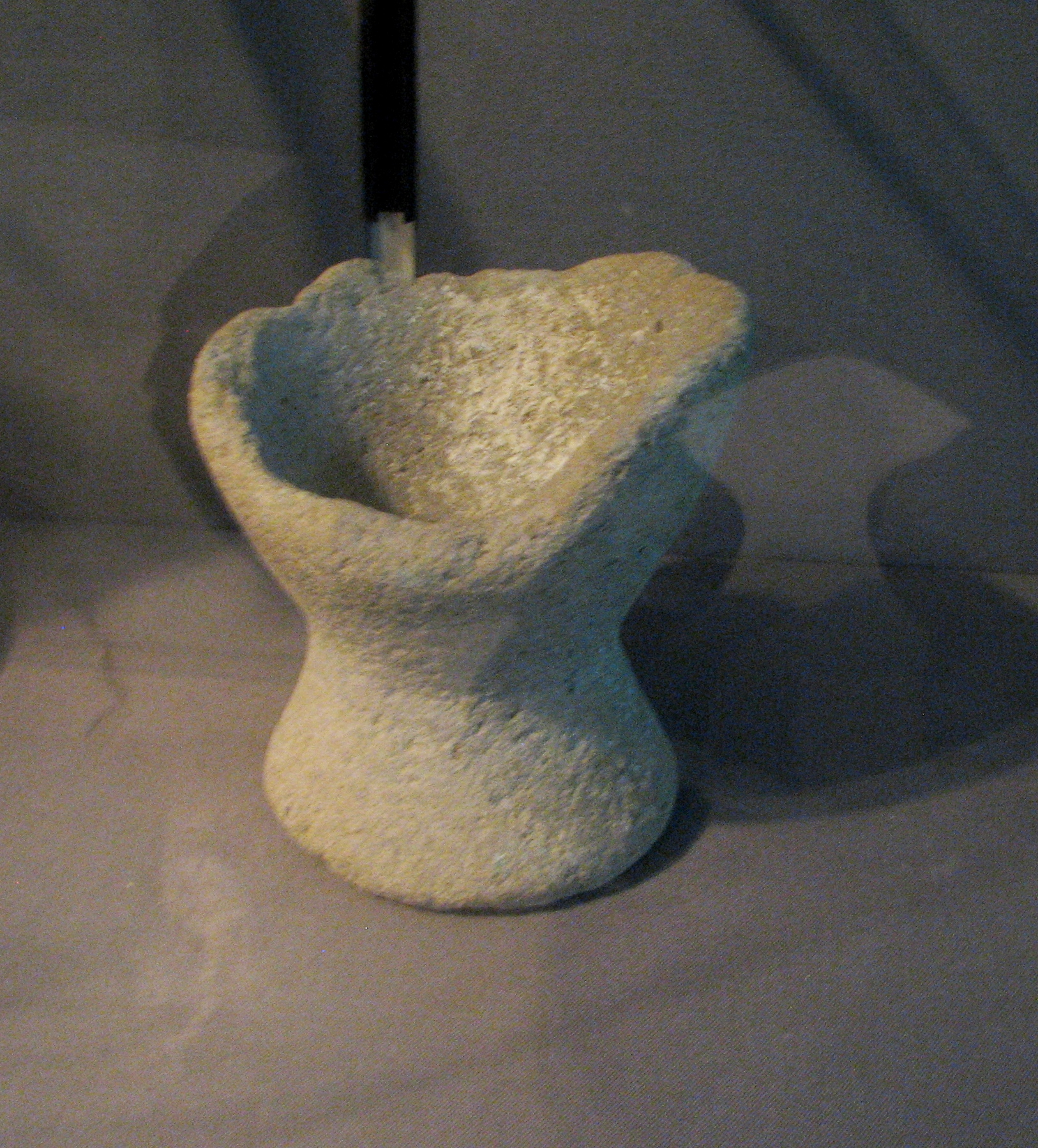 Atlit Yam is an ancient submerged Neolithic village off the coast of Atlit, Israel. The site is dated to the final Pre-Pottery Neolithic B site of Atlit Yam dates between 6900 and 6300 BC. Moshe Stekelis Museum of Prehistory exhibition in Haifa Israel The exhibition is based on the excavations and researches of the Haifa University and Antiquities Authority. Photography by Yosef Galili, Ehud Galili, Itamar Greenberg הכפר הניאוליתי בעתלית-ים שוכן בתוך הים במרחק 400 מטר מקו החוף, מערבית לשפך נחל אורן בעורפו של רכס כורכר טבוע שבהמשכו דרומה נמצא מבצר עתלית הצלבני. האתר נמצא בעומק של 12-8 מטר מתחת לפני הים. האתר מתוארך לסוף התקופה הנאוליתית קדם קרמית ב סוף האלף ה-6 לפנה"ס ממצאים מהאתר מוצגים במוזיאון לפרהיסטוריה ע"ש משה שטקליס בחיפה הנמצא בתוך גן החיות במרכז הכרמל התערוכה מבוססת על חפירות ומחקרים שהתבצעו על ידי אוניברסיטת חיפה ורשות העתיקות הצילומים מהחפירות המוצגים בתערוכה צולמו על ידי יוסקה גלילי, אהוד גלילי ואיתמר גרינברג קערת בזלת